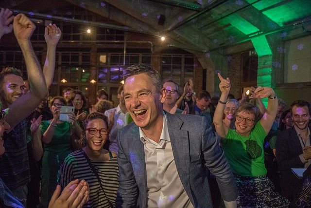 Elections communales du 14 octobre 2018